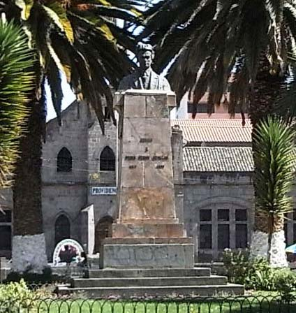 Monumento a Pedro Fermín Cevallos, en el parque del mismo nombre